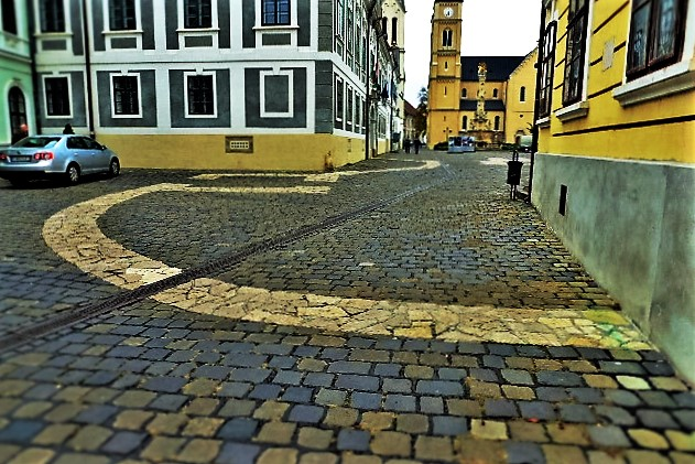 A veszprémi vár régi falvonalai a járdaburkolaton